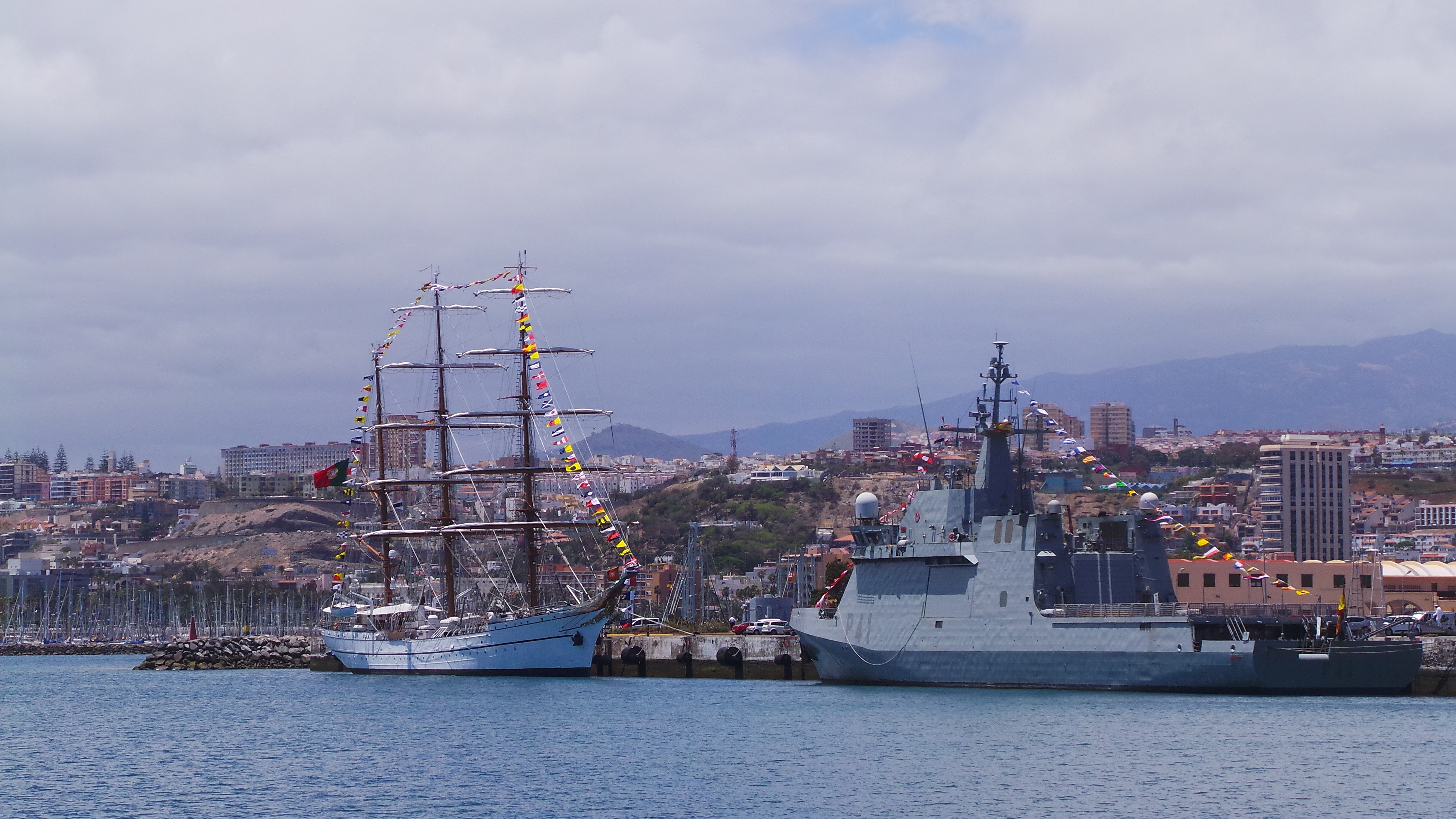 Visita al Buque Escuela NRP Sagres, en La Base Naval de Las Palmas de Gran Canaria. Este fin de semana de semana ( 20, 21 y 22 de junio de 2014) tenemos la oportunidad de disfrutar, en Las Palmas de Gran Canaria, de la visita del buque escuela portugués NRP Sagres, se encuentra atracado en el muelle de la base naval y podrá ser visitado hoy viernes hasta las 19h y mañana sábado de 10 a 12h y de 14 a 19h . El Buque proveniente de Lisboa partirá el domingo hasta Las Azores , para luego regresar a Lisboa, cuenta con unos 60 guardiamarines, con una decena de mujeres entre ellos, que realizan su periodo de instruccion Construido en 1937 en Hamburgo y tras varios avatares, fue adquirido en 1961 por la marina Portuguesa para sustituir al Sagres II, entrando en servicio como Sagres III en febrero de 1962. Tiene 89,5 metros de eslora, 12 de manga y 5,5 de calado, siendo su altura máxima de 45,5 metros. Cuenta además con 1.971 metros cuadrados de vela y desplaza 1.893 toneladas. La figura del mascarón de proa del Sagres III es el Infante D. Henrique nacido el 4 de marzo de 1394, siendo uno de los impulsores de la expansión y descubrimientos portugueses de la época. Más información del Buque : Web del Buque